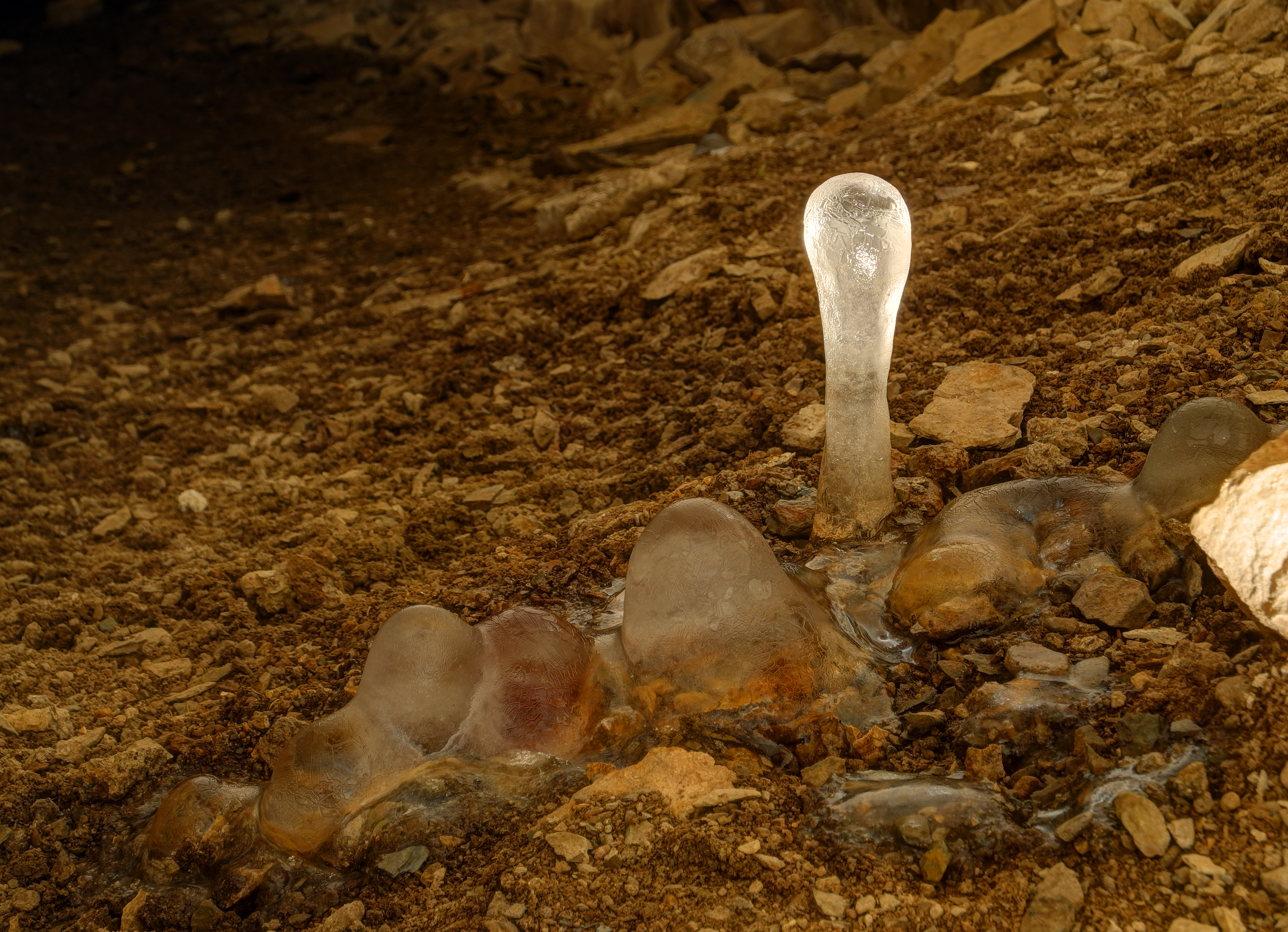 Fort du Salbert : stalagmite de glace (HDR).